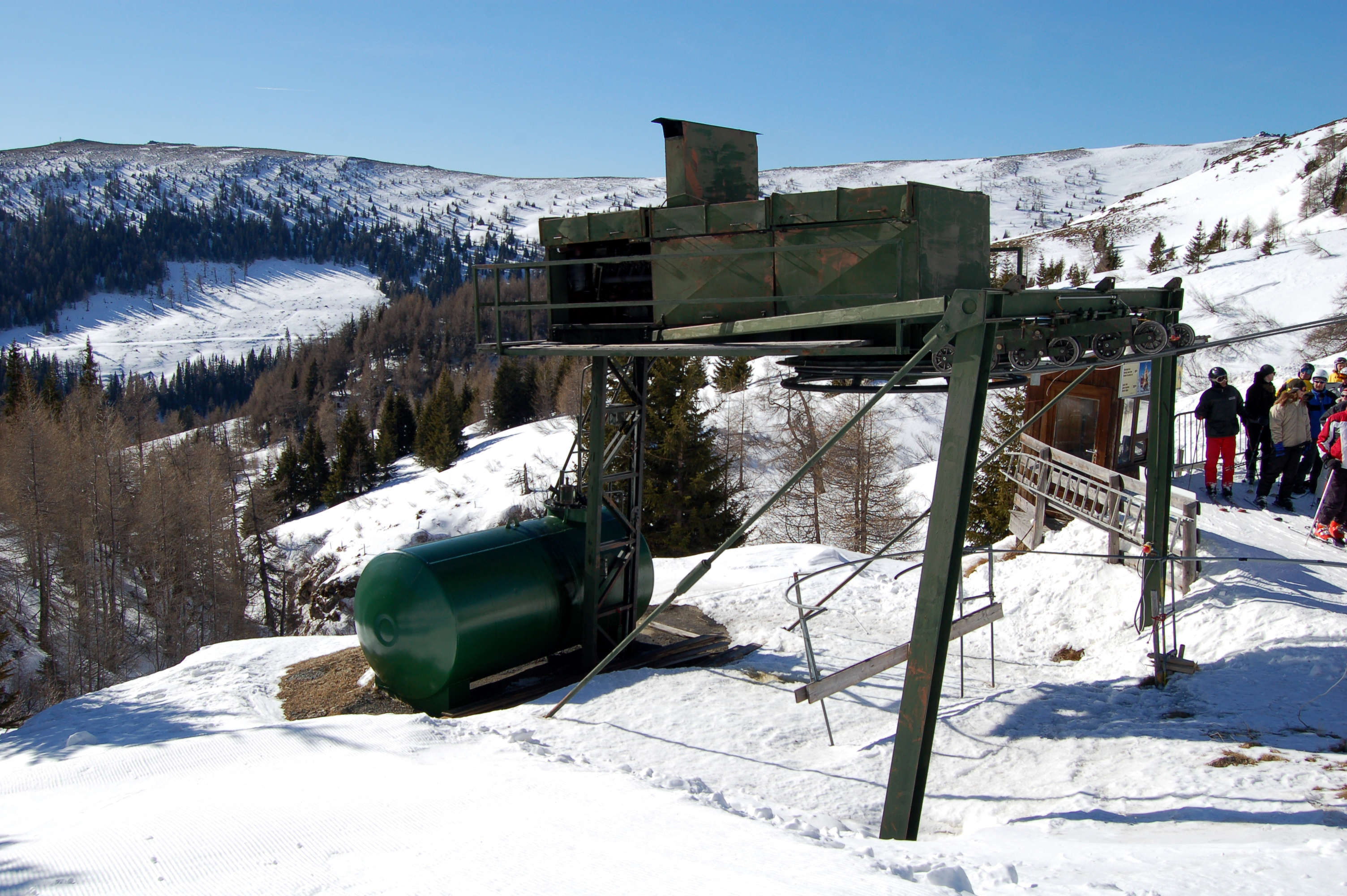 Schlepplifttalstation aus den 1970er Jahren (73, oder 78), Schlepplift auf den Hohen Zinken 2222m im Schigebiet Lachtal in den Wölzer Tauern in der Steiermark